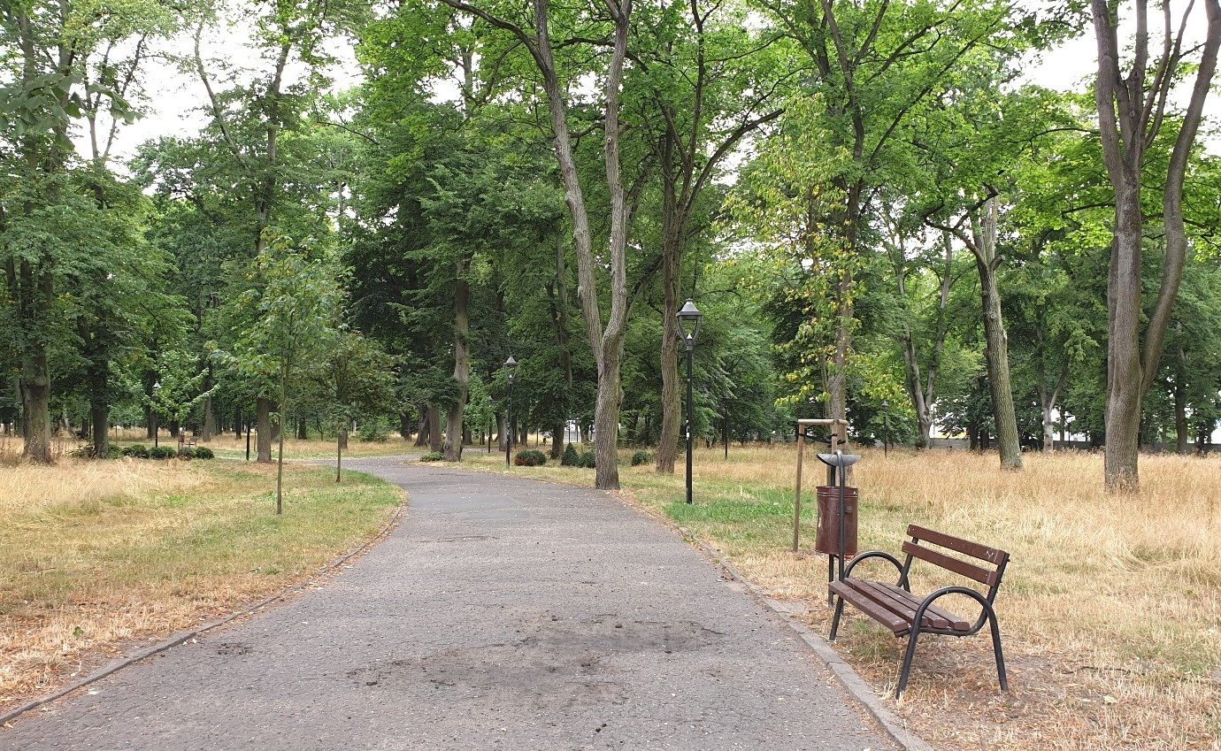 Stargard. Park Stefana Batorego